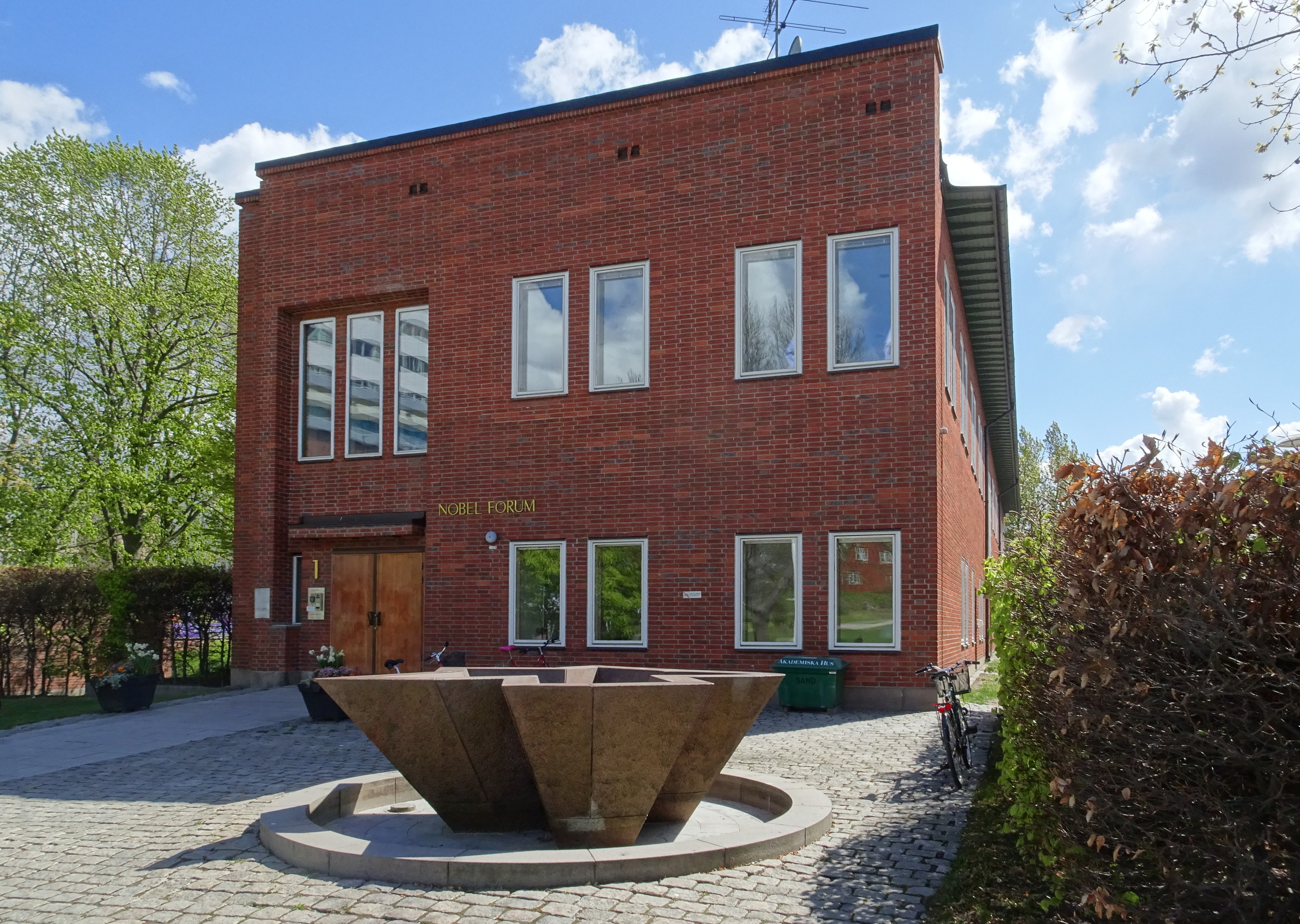 Nobel Forum, Campus Solna, Nobels väg 1, Solnavägen 1, byggår 1993, arkitekt Johan Celsing.